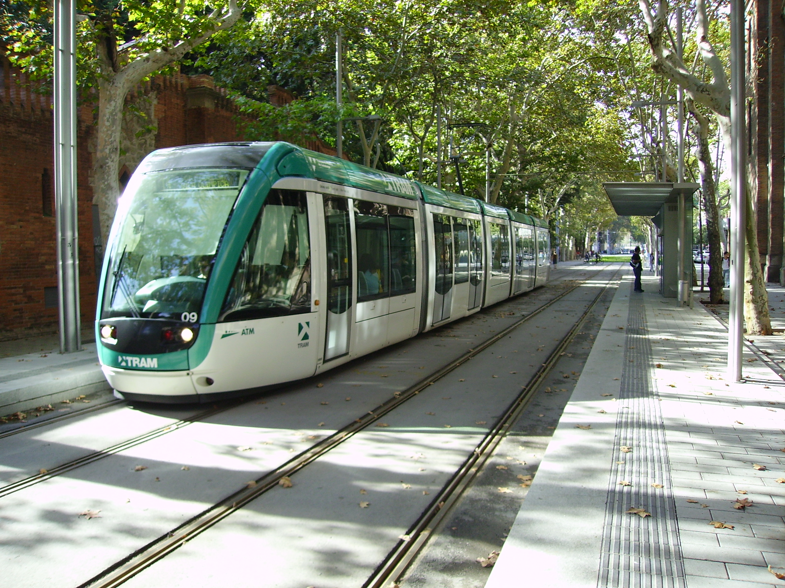 Tranvía de la línea T4 de Trambesòs